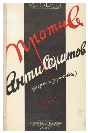 Михаил Горев, «Против антисемитов. Очерки и зарисовки», Москва-Ленинград, Госиздат, 1928 г.